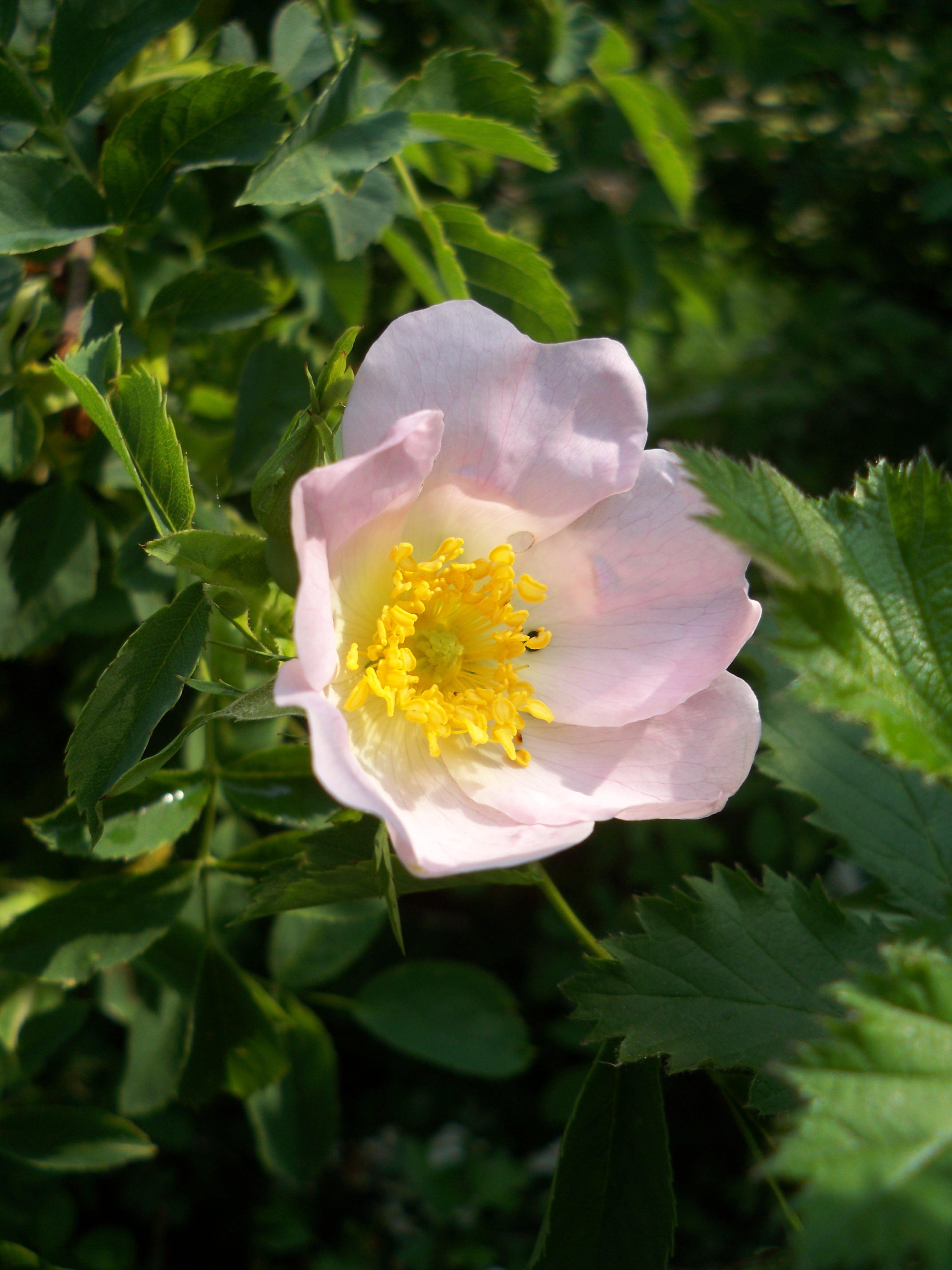 Photo d'une fleur de rosier des chiens (rosa canina)